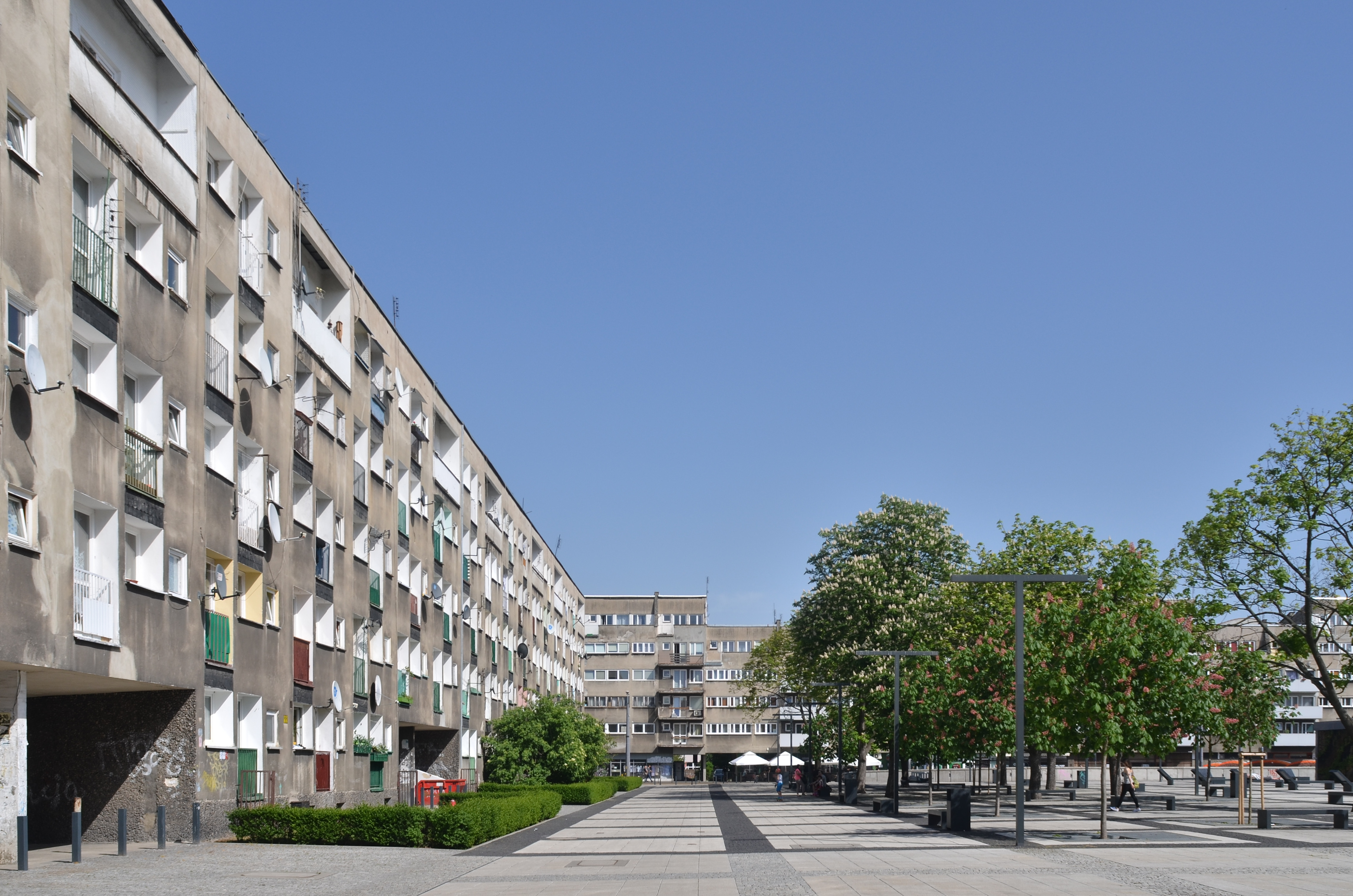 The housing complex along the Nowy Targ square in Wrocław, built in 1950s.